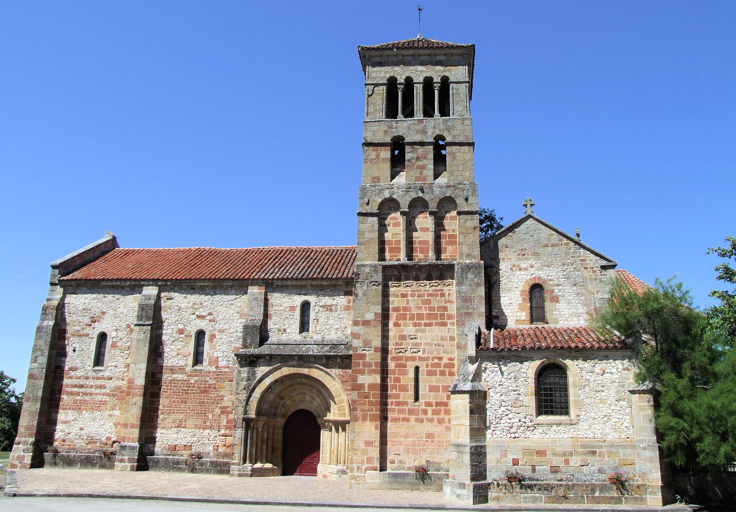 Agonges - Eglise Notre-Dame - Ensemble